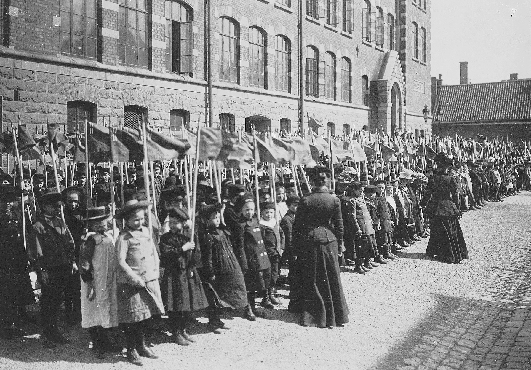 Barn samlas utanför Katarina södra folkskola